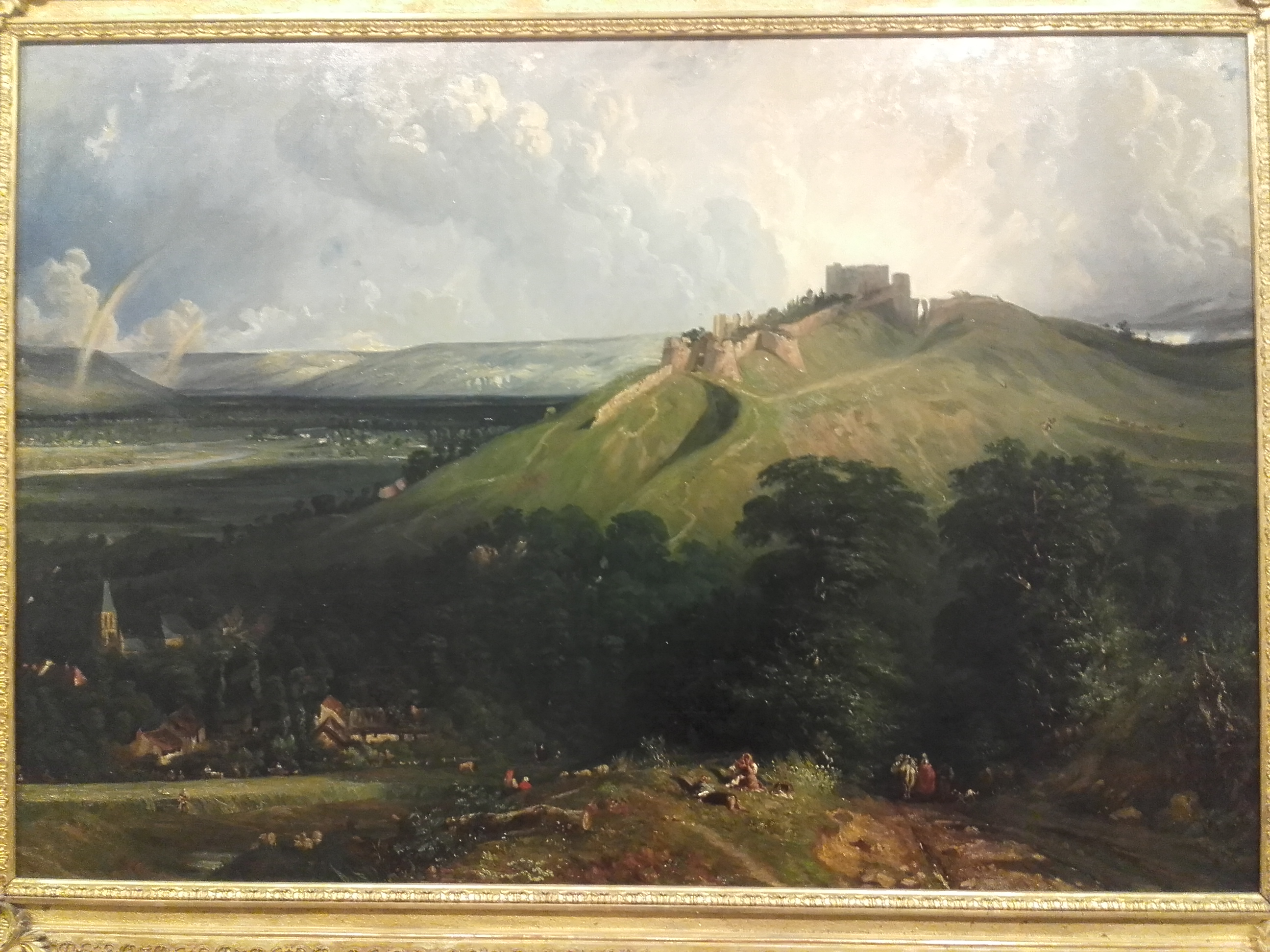 Vue du château d'Arques près de Dieppe par Paul Huet